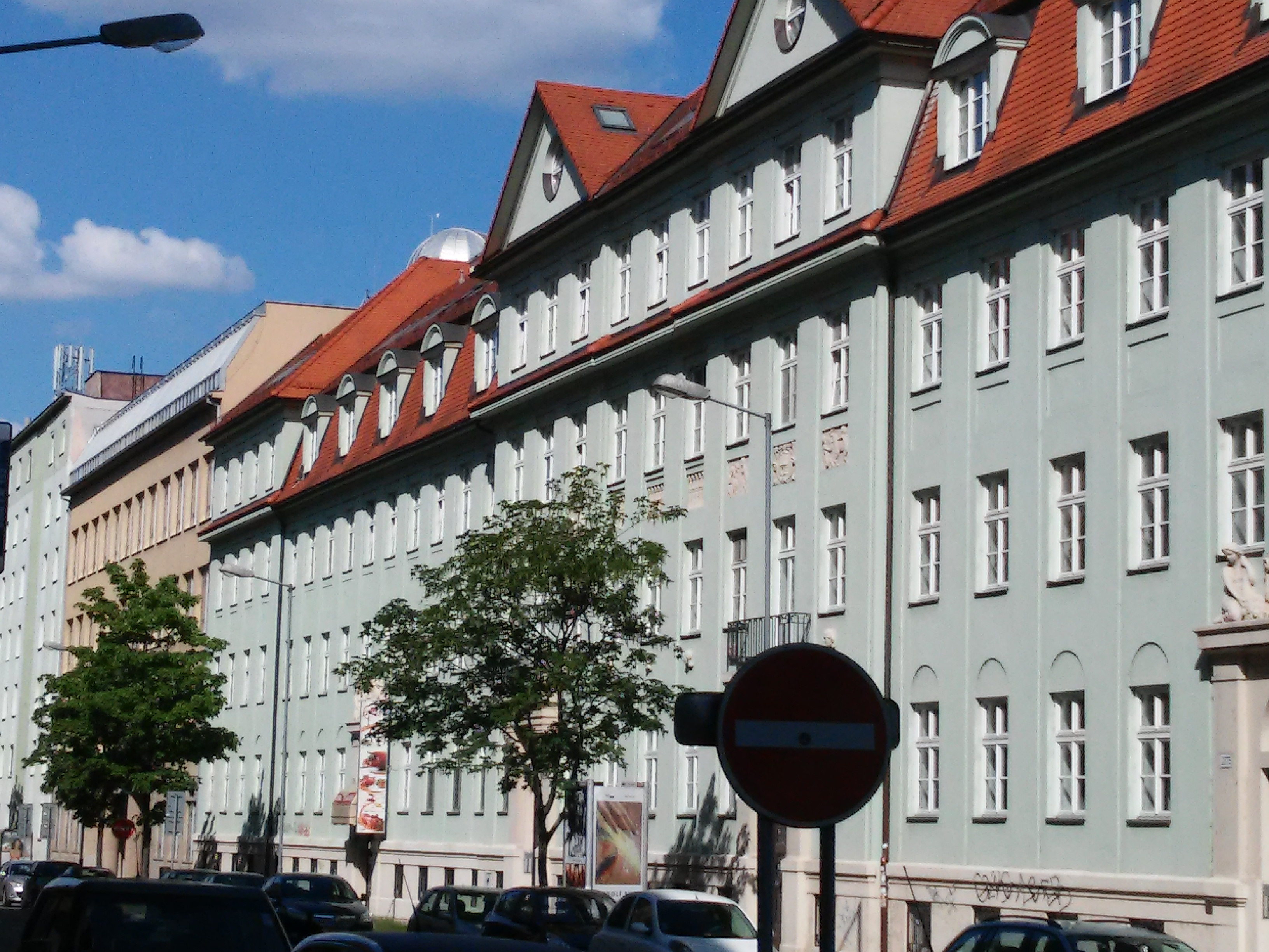 Mýtna, Bratislava